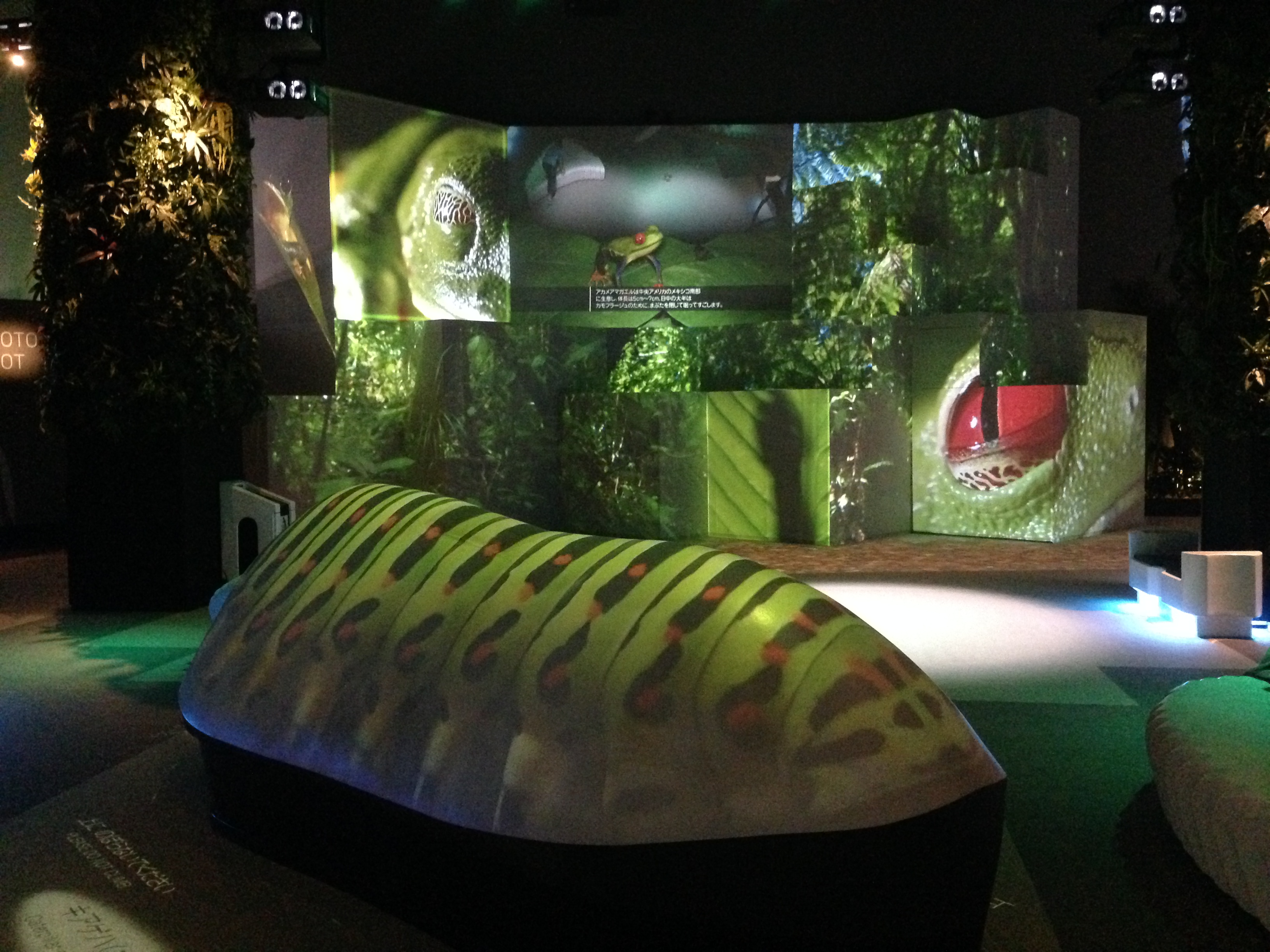 オービィ横浜（Orbi Yokohama）の館内の様子（撮影可能エリア）。休憩スペースにもなっているエキシビションゾーン「ベースキャンプ」。